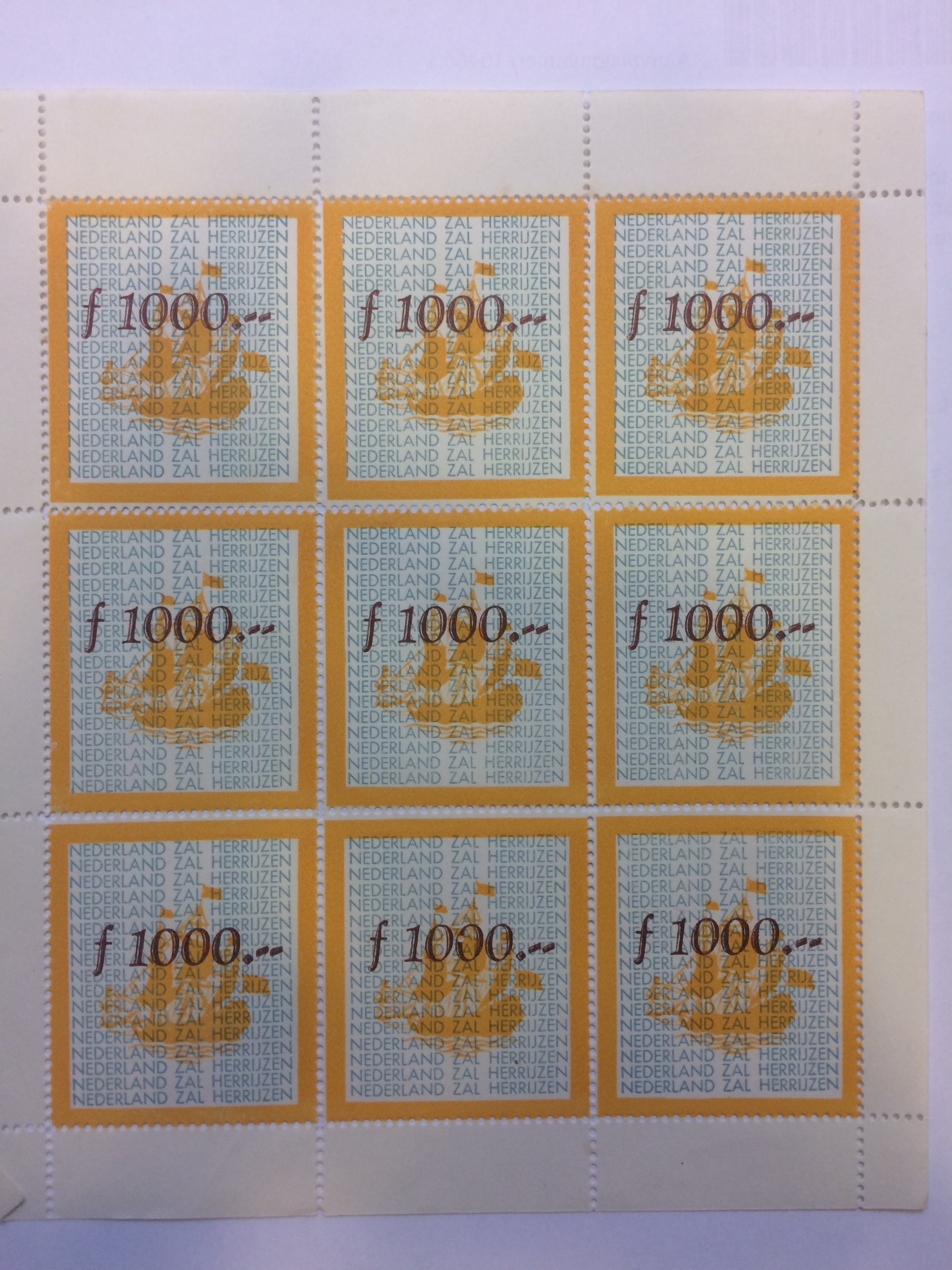 Zegels ingevoerd door de Friese tak van het Nationaal Steunfonds onder leiding van Jan Evenhuis